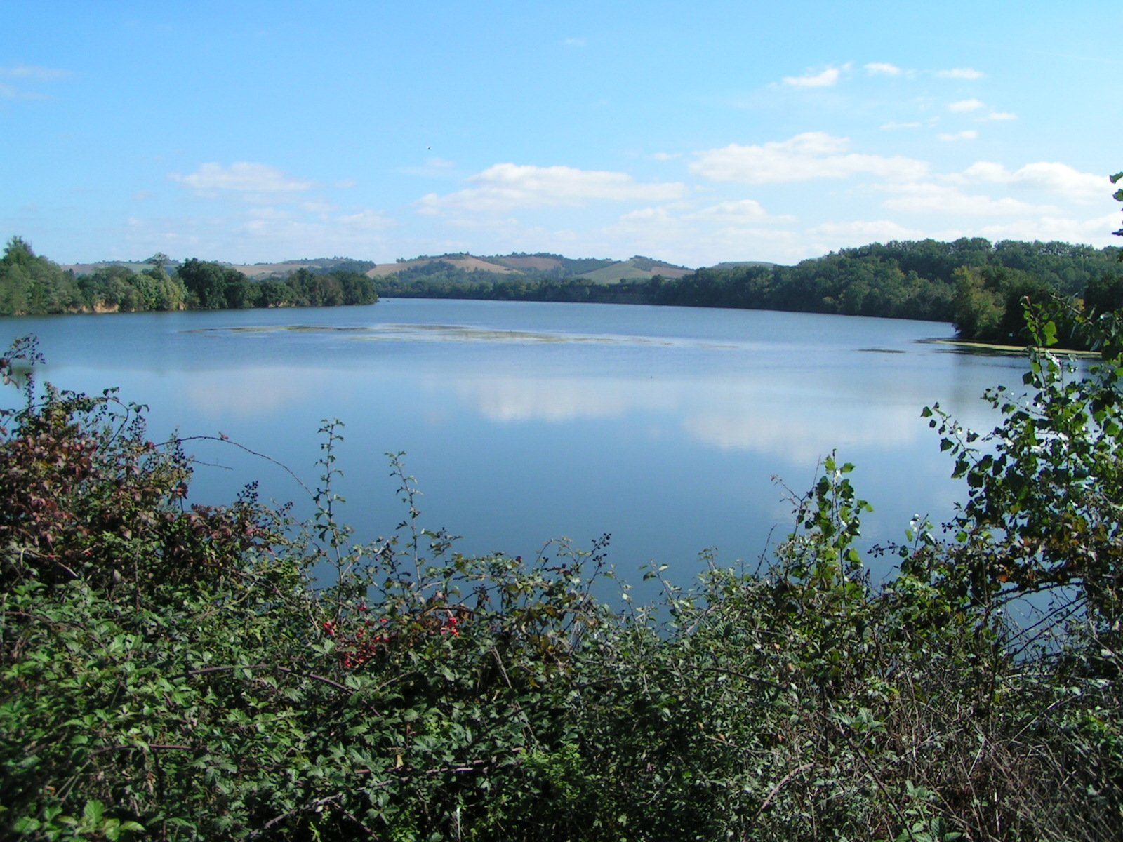 Plan d'eau de Carbonne.